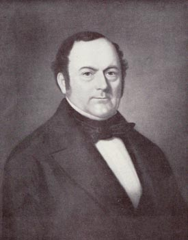 Tobaksfabrikören Jacob Fredrik Ljunglöf (1796-1860). Oljemålning av konstnären Amalia Lindegren (1814-1891).